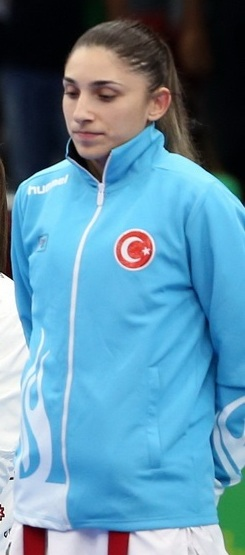 رزیتا علی‌پور در فینال مسابقات کاراته بازی‌های کشورهای اسلامی2017/باکو